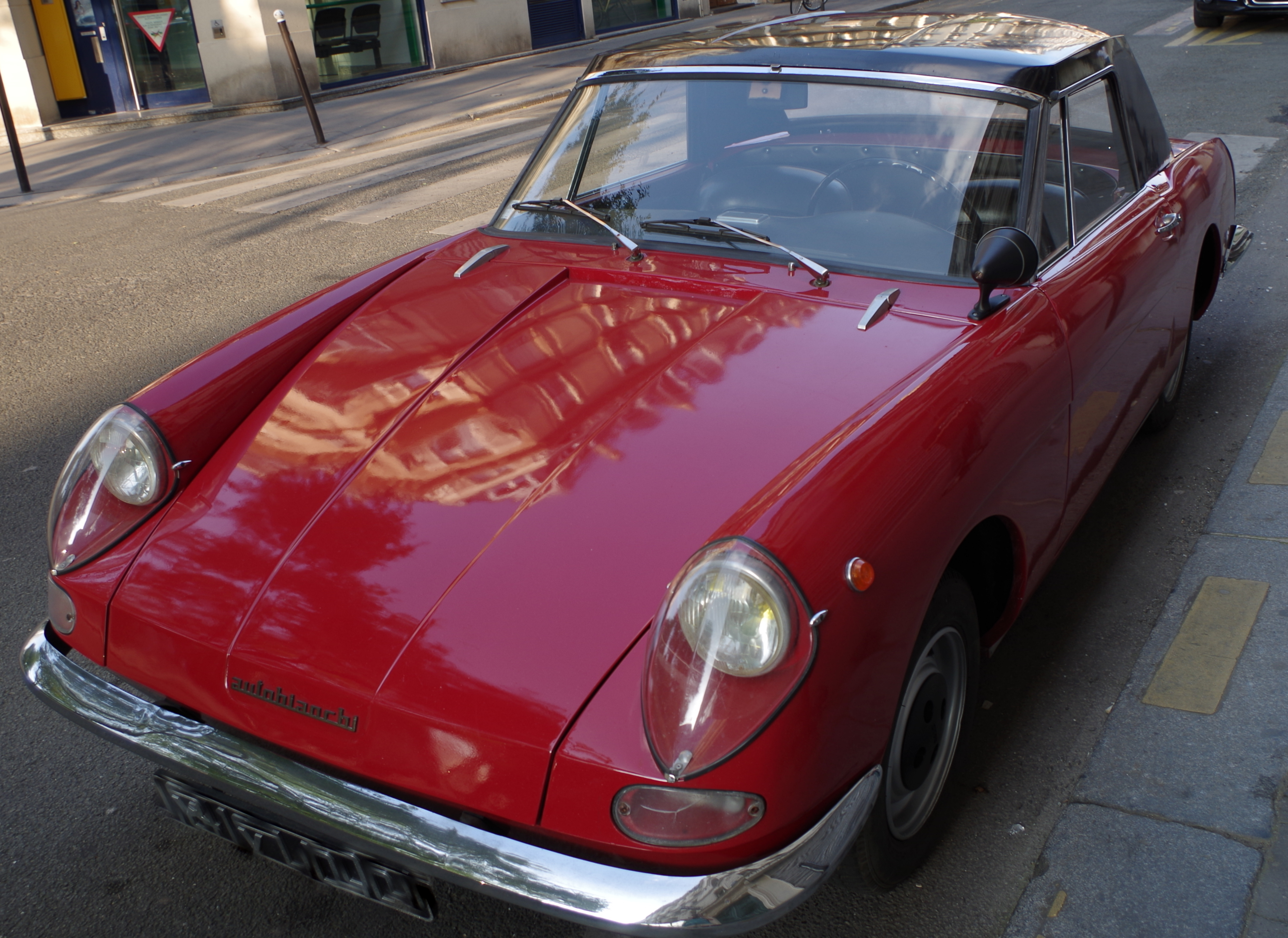 Stellina 800 rouge